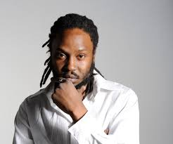 Lyricson - Love Therapy